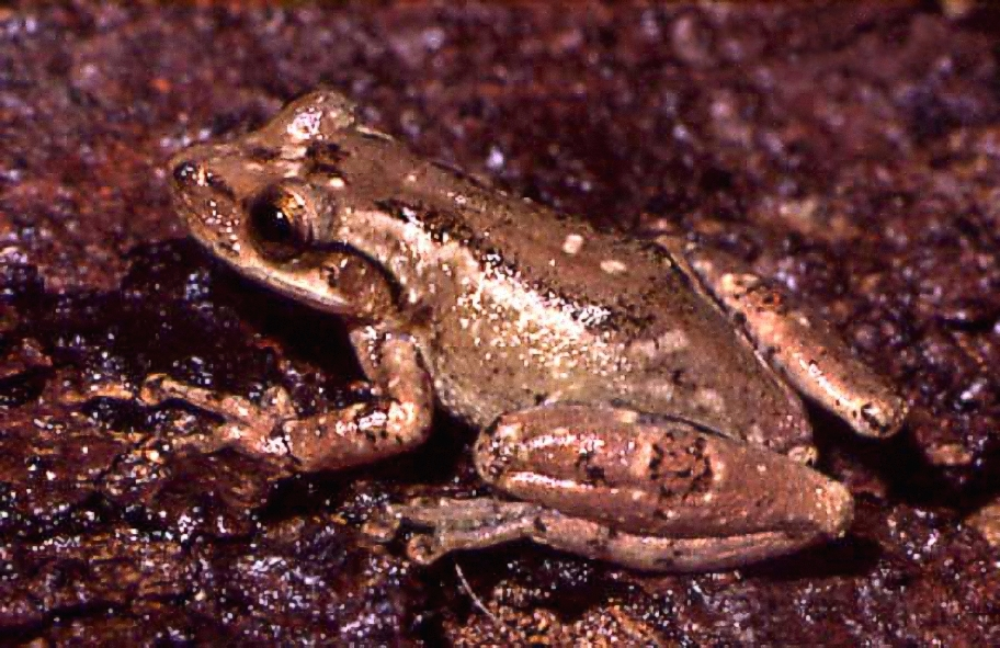 Scinax alter